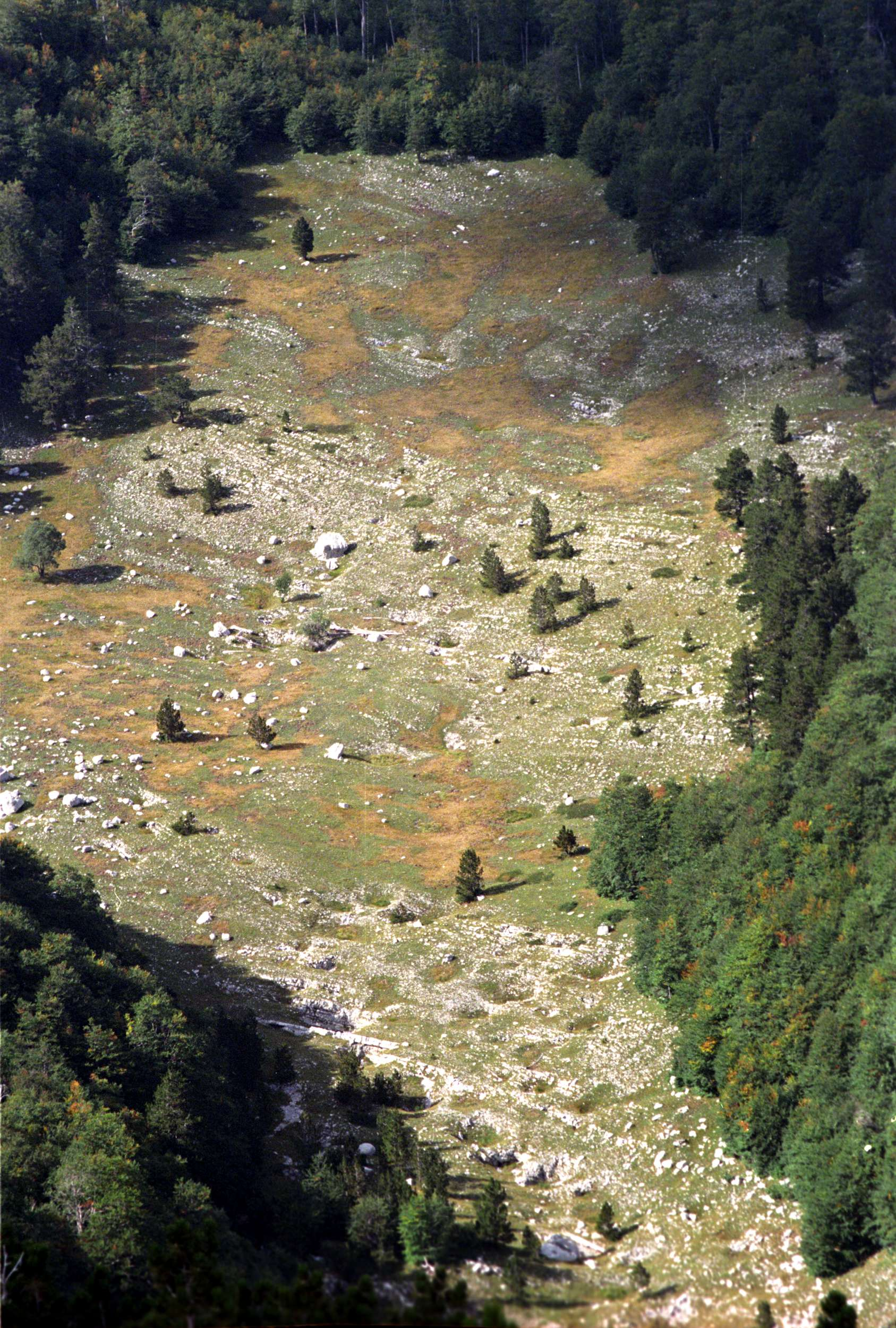 Valley Pirina poljana Copyright (c) 2002 Pavle Cikovac.